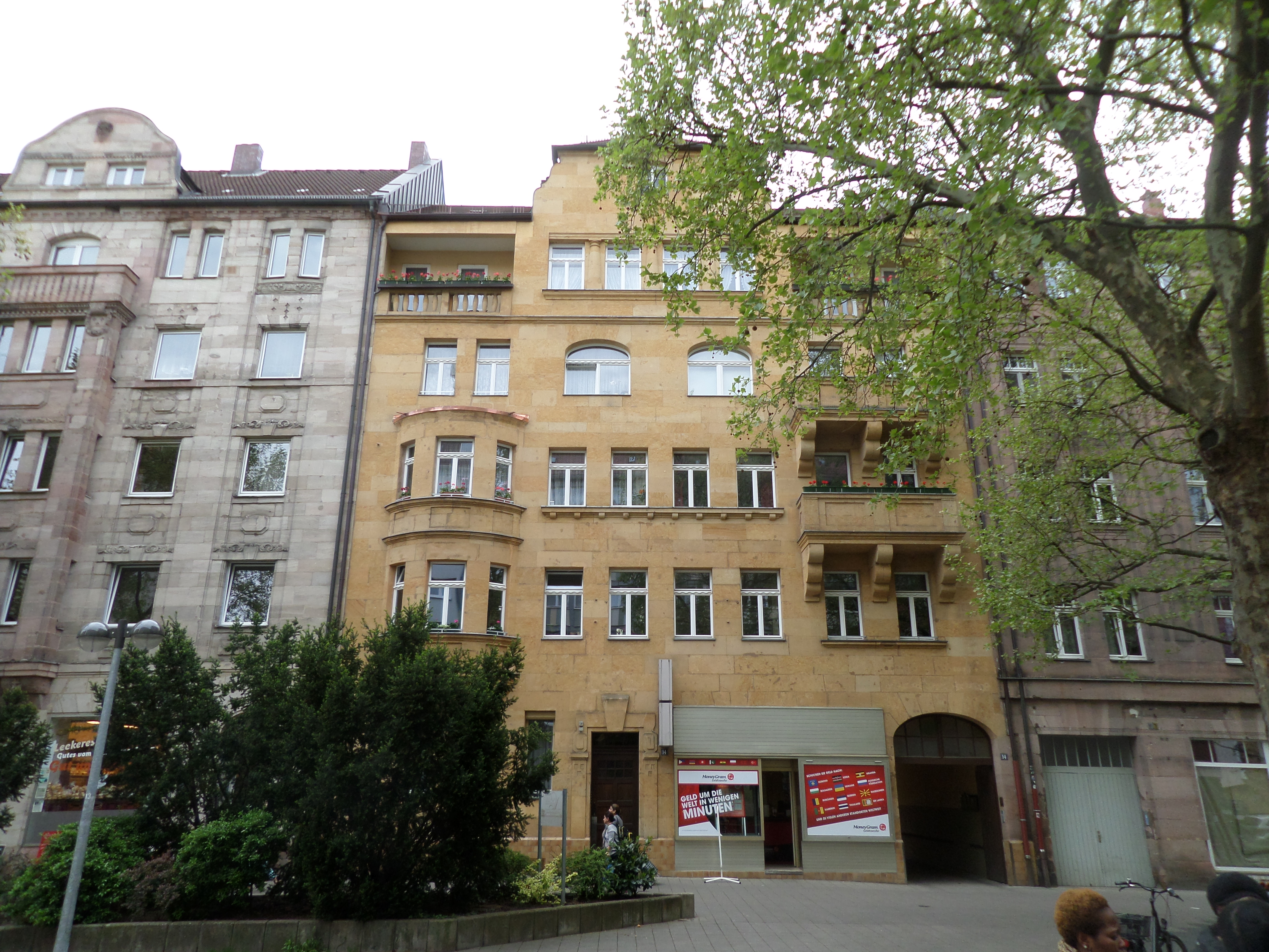 Kopernikusplatz 14 Mietshaus D-5-64-000-1084